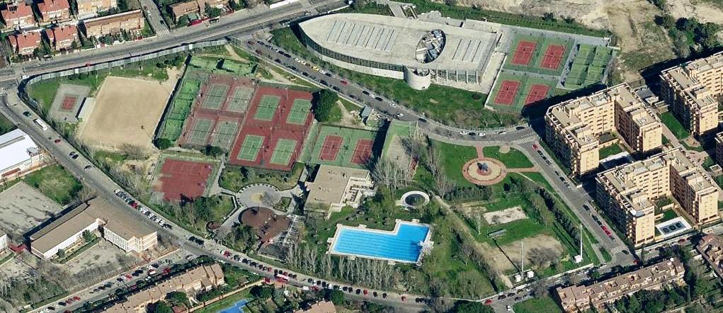 Foto Aerea del Club Brezo y del Polideportivo "El Barco"